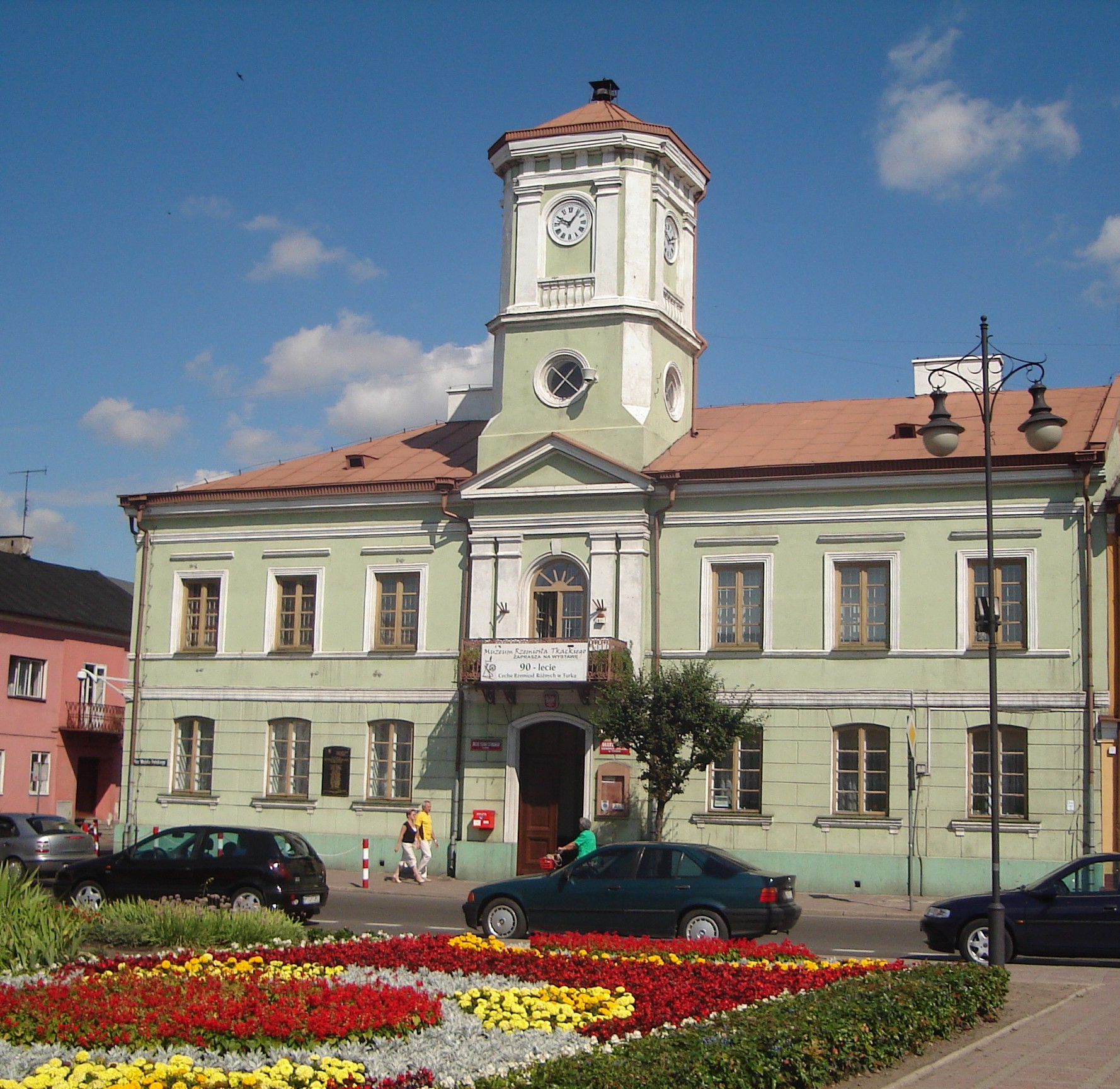 Ratusz w Turku